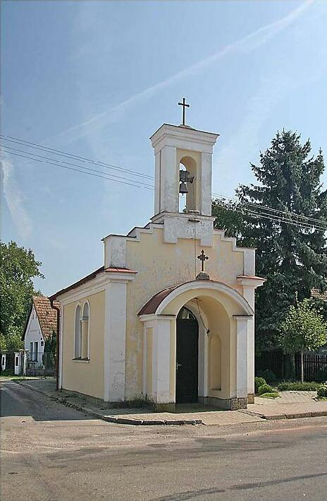 Kaple na křižovatce v obci Humburky, district Hradec Králové autor:Prazak date: 6. 2006